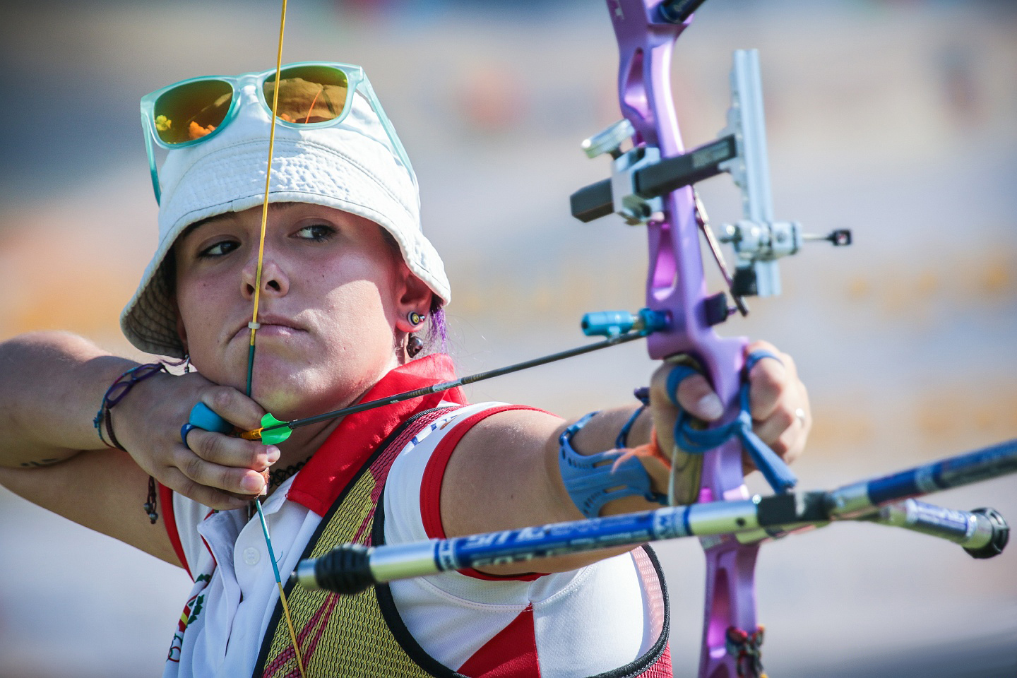 Adriana Martín, final de oro en el Cto. Europa Junior de Rumanía 2016